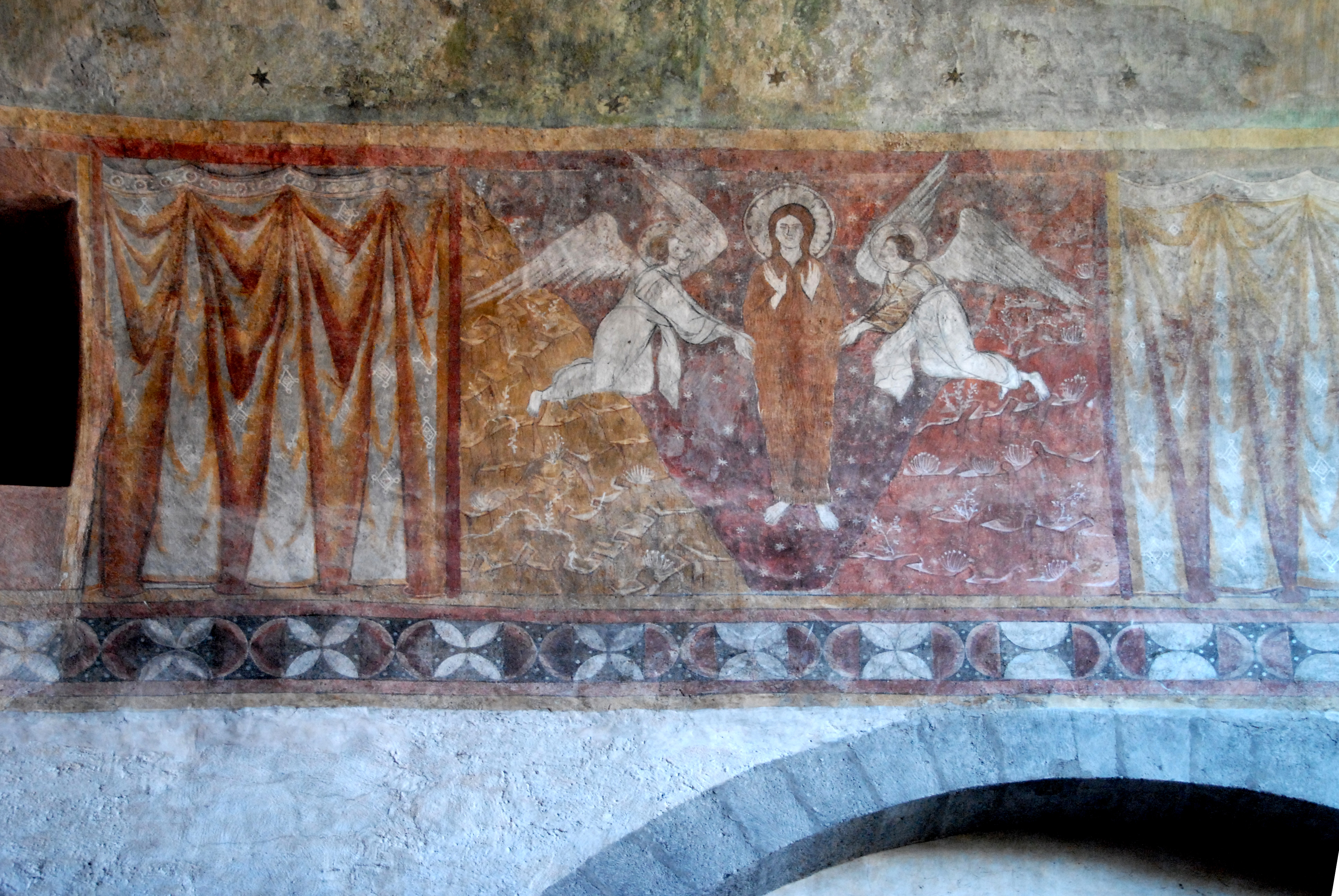 Kirche St.-André Lavaudieu, Südwand, Freskoband, Entführung Maria Magdalenas durch 2 Engel